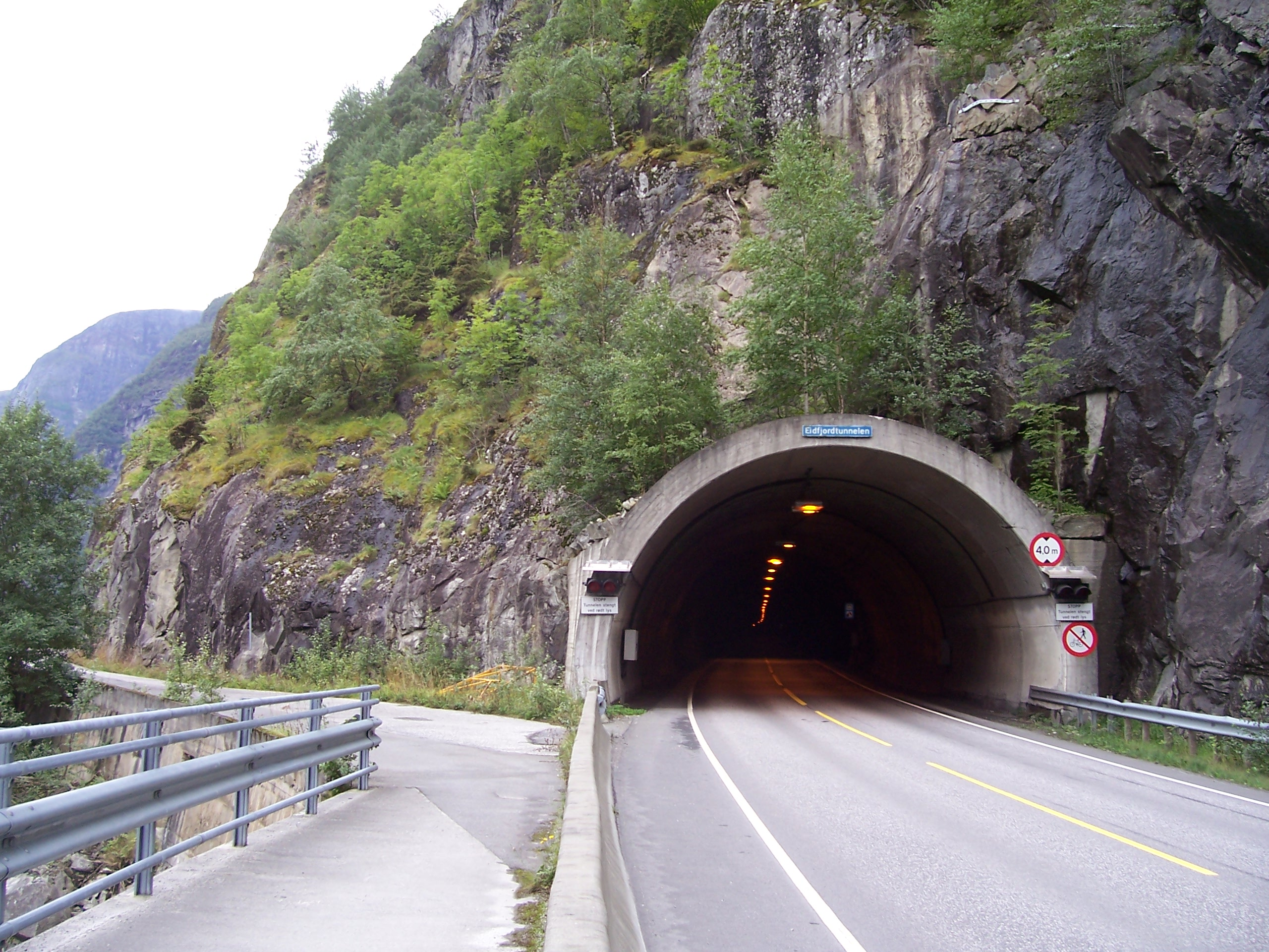 Eidfjordtunnelen, Norway